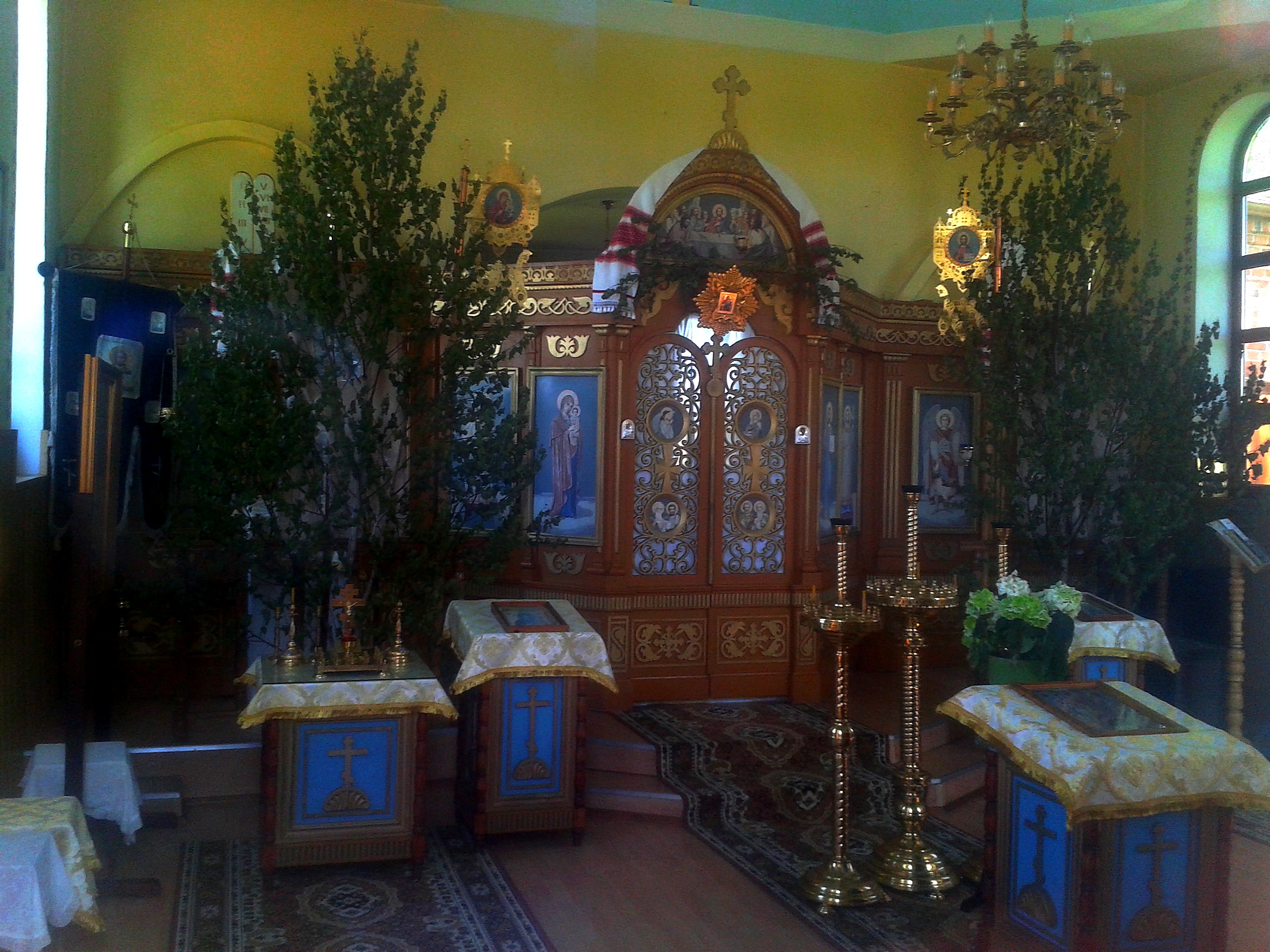 Ikonostas cerkwi św. Michała Archanioła w Holeszowie